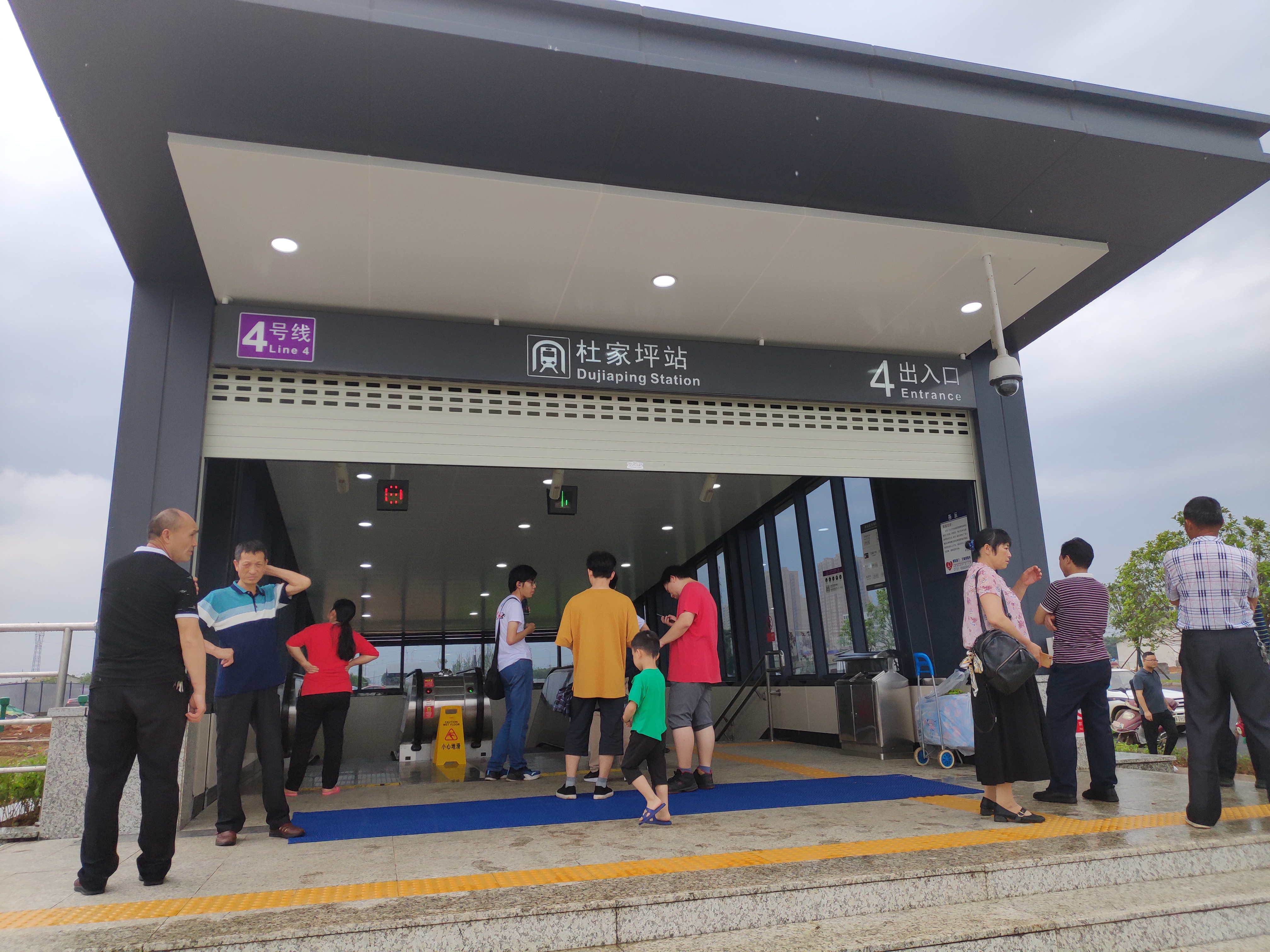 中文（香港）: 長沙地鐵4號線杜家坪站四號出入口